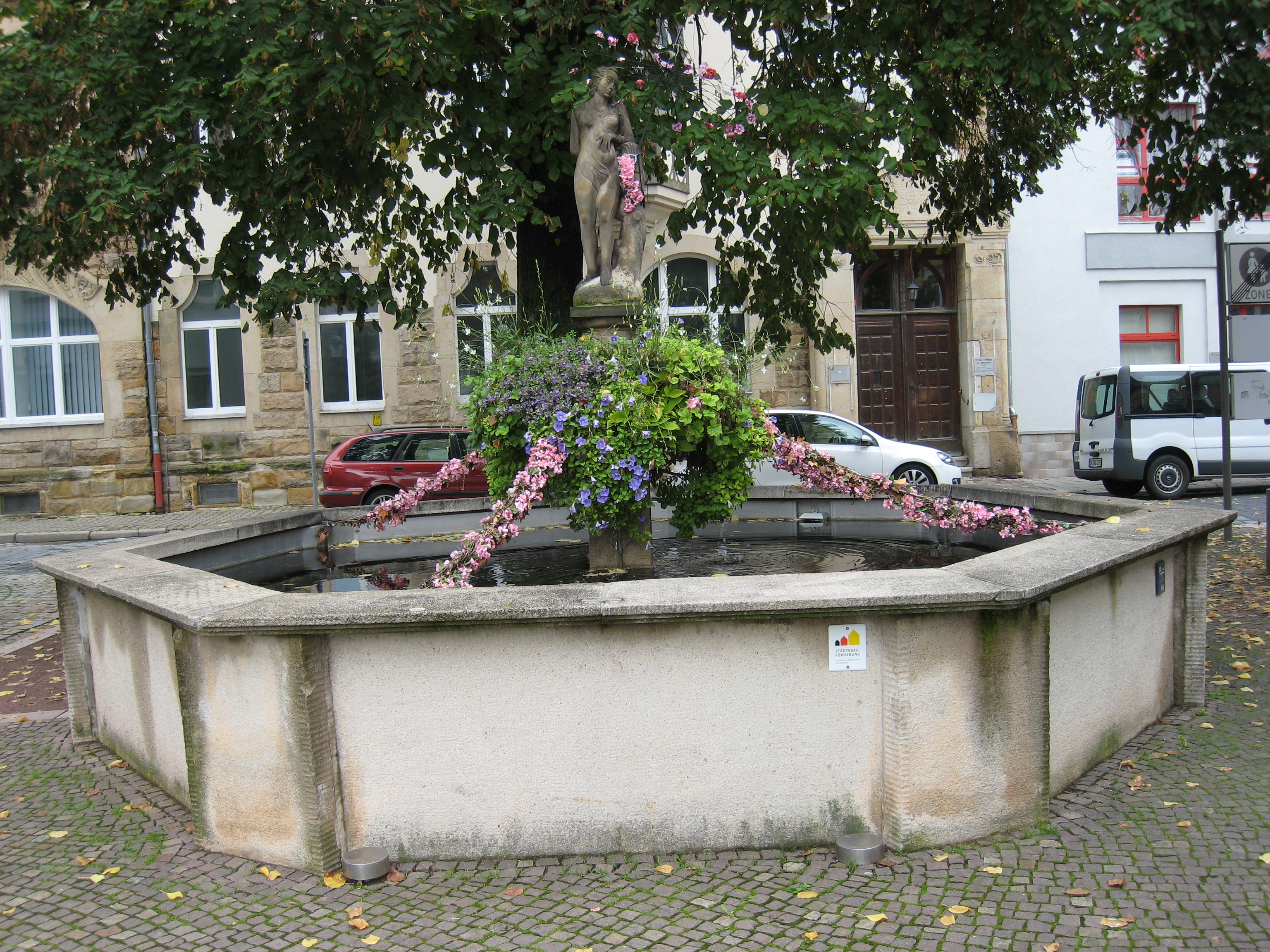 Holzmarktbrunnen in Arnstadt